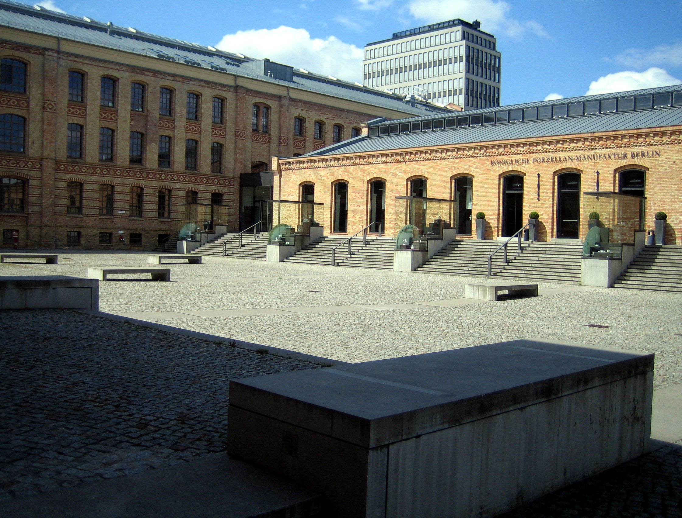 Königliche Porzellan Manufaktur (KPM) Berlin. Hof mit der ehemaligen Ofenhalle (rechts), heute Ausstellungs- und Verkaufsräume.